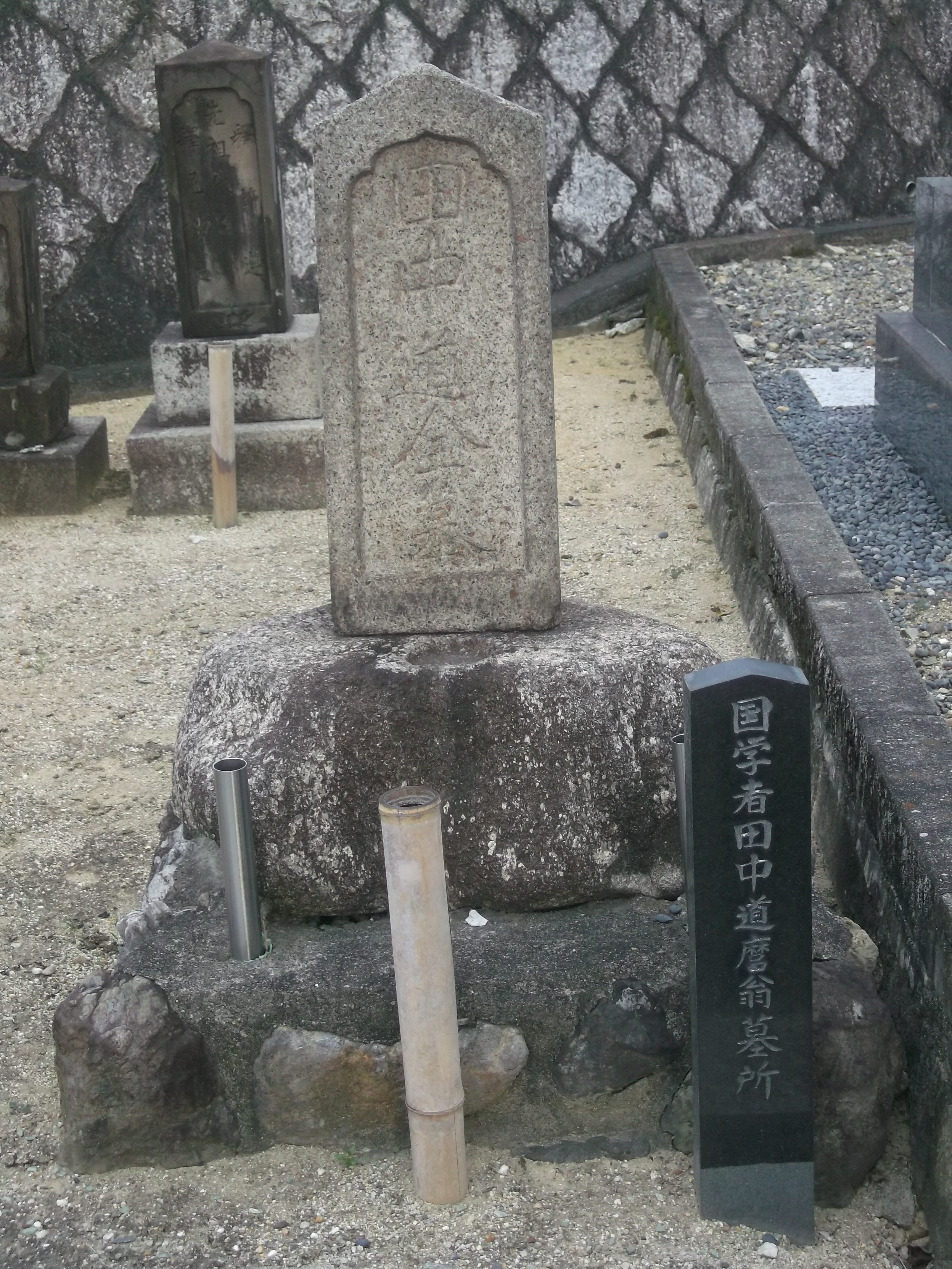 名古屋市千種区の平和公園常端寺墓地にある田中道麿の墓。